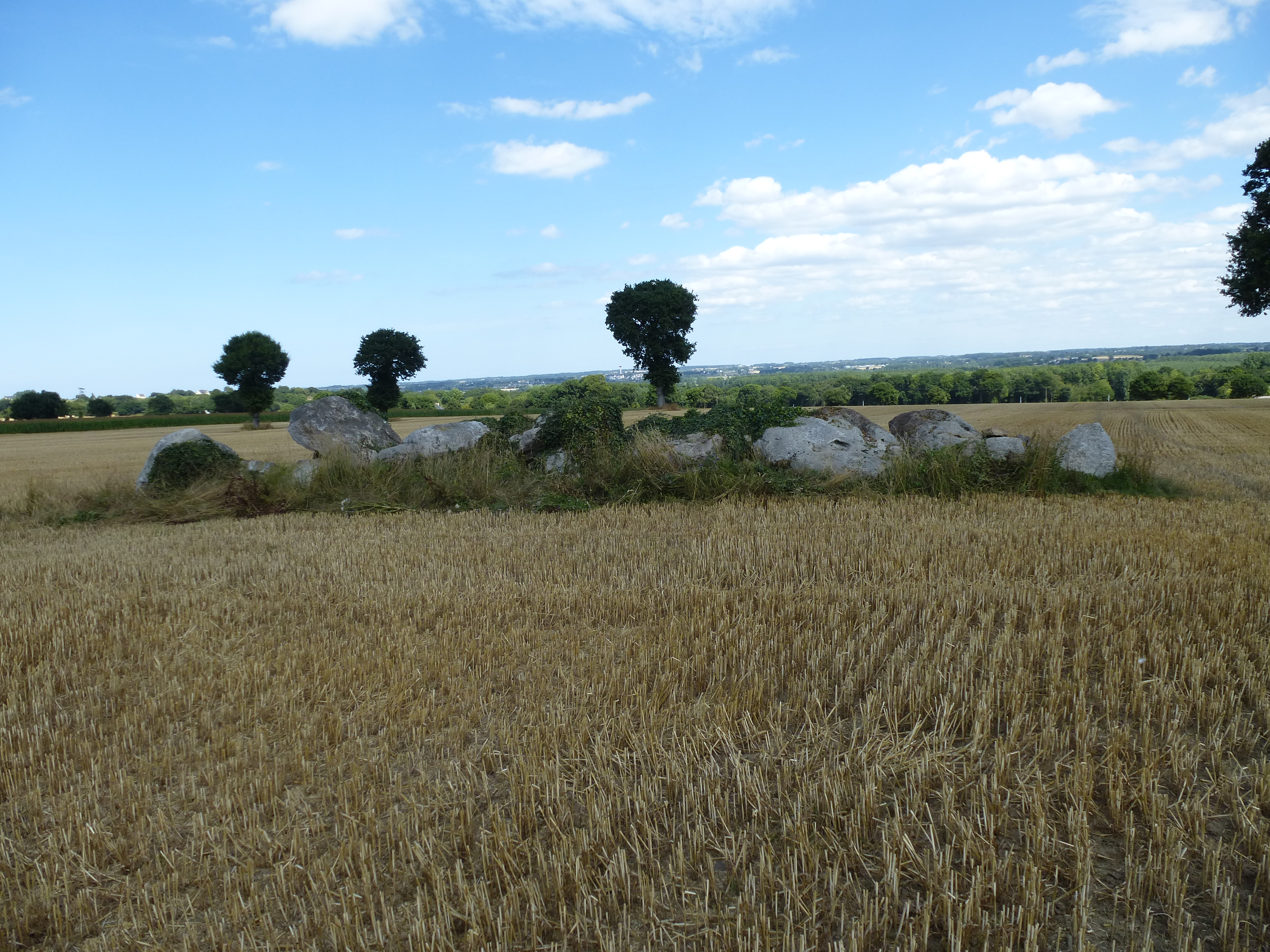 Allée couverte de la Hautière. (commune de Trégon, département des Côtes-d'Armor, région Bretagne).